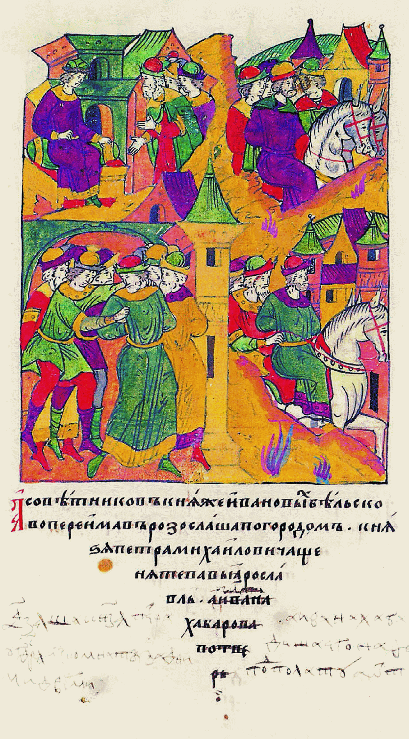 Миниатюра Лицевого летописного свода XVI в.: "А советников князя Ивана Бельского, схватив, разослали по городам: князя Петра Михайловича Щеняте- ва в Ярославль. А взяли князя Петра у государя из комна- ты задними дверями, а Ивана Хабарова взя- ли и посадили его на дворе Фомы Головина в погреб под палату, а оттуда сослали его в Тверь.».